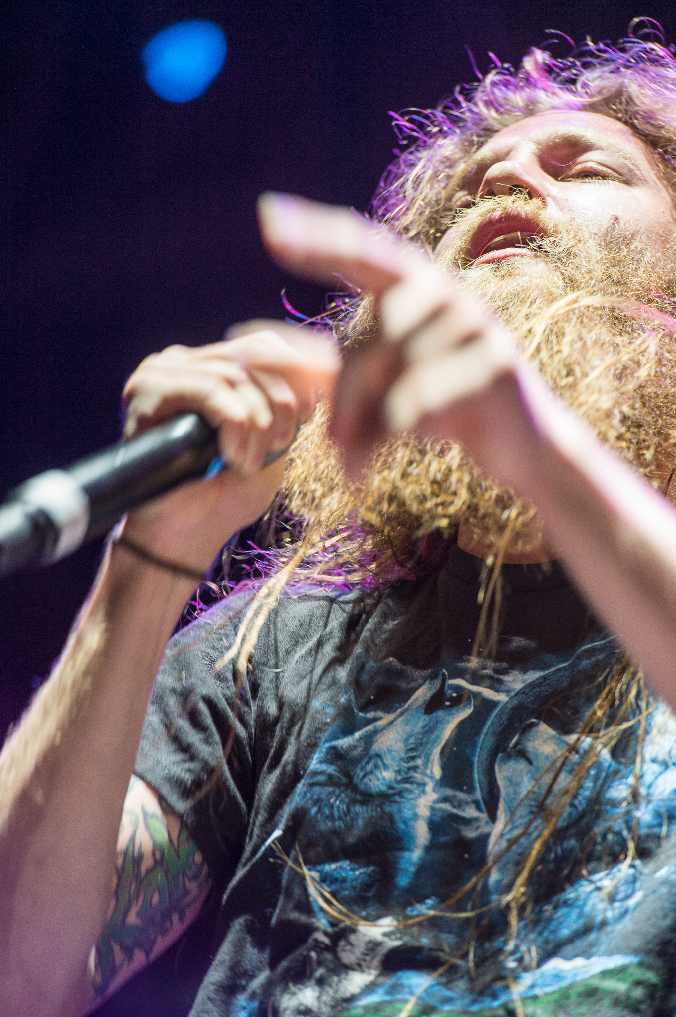 ARGO-Konzerte,Arena Nürnberger Versicherungen,Battlecross,Clubstage,Konzert,Kyle “Gumby” Gunther,Livekonzert,Livemusik,Musik,RiP,Rock im Park 2014